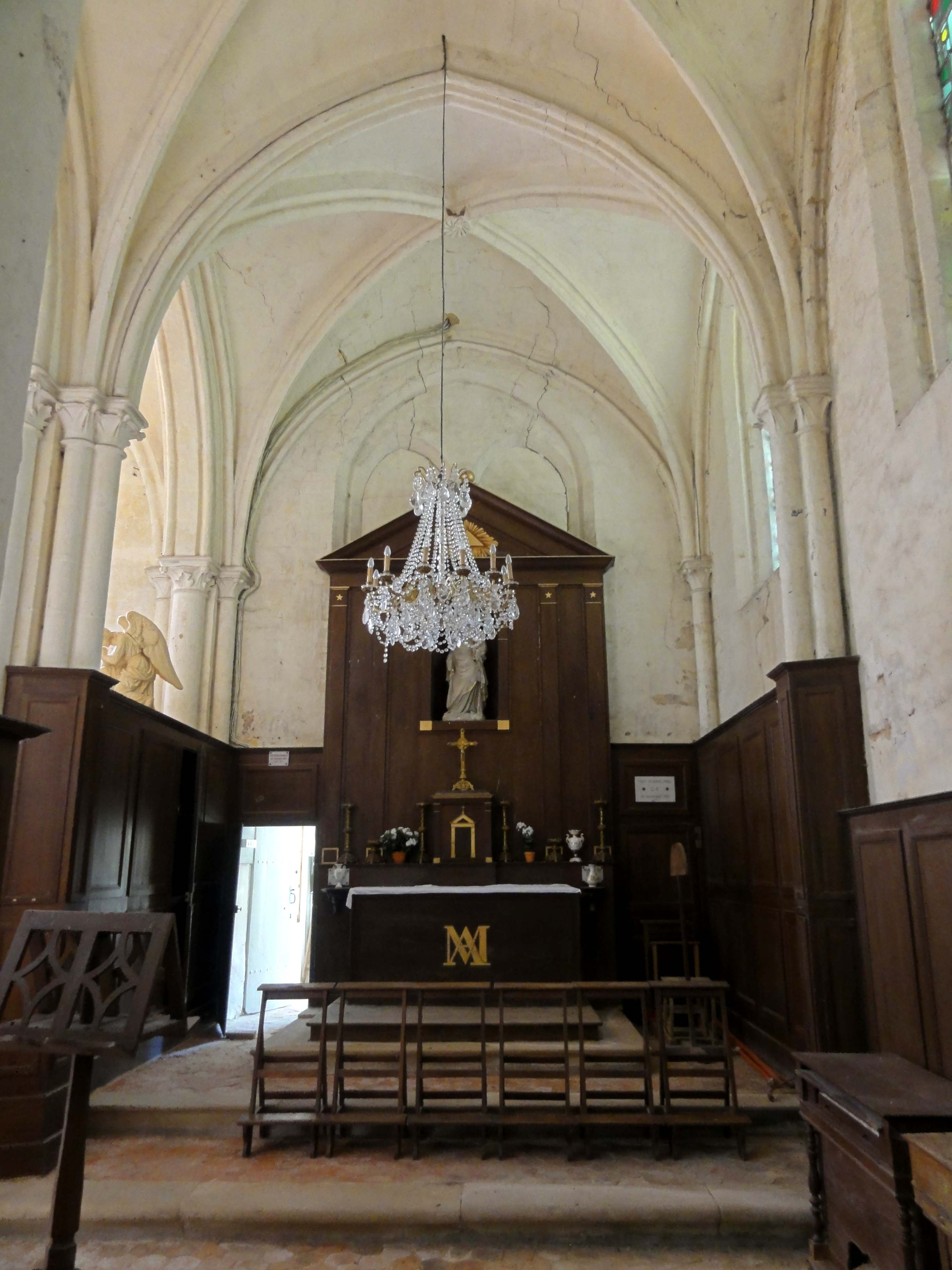 Intérieur de l'église - voir titre.